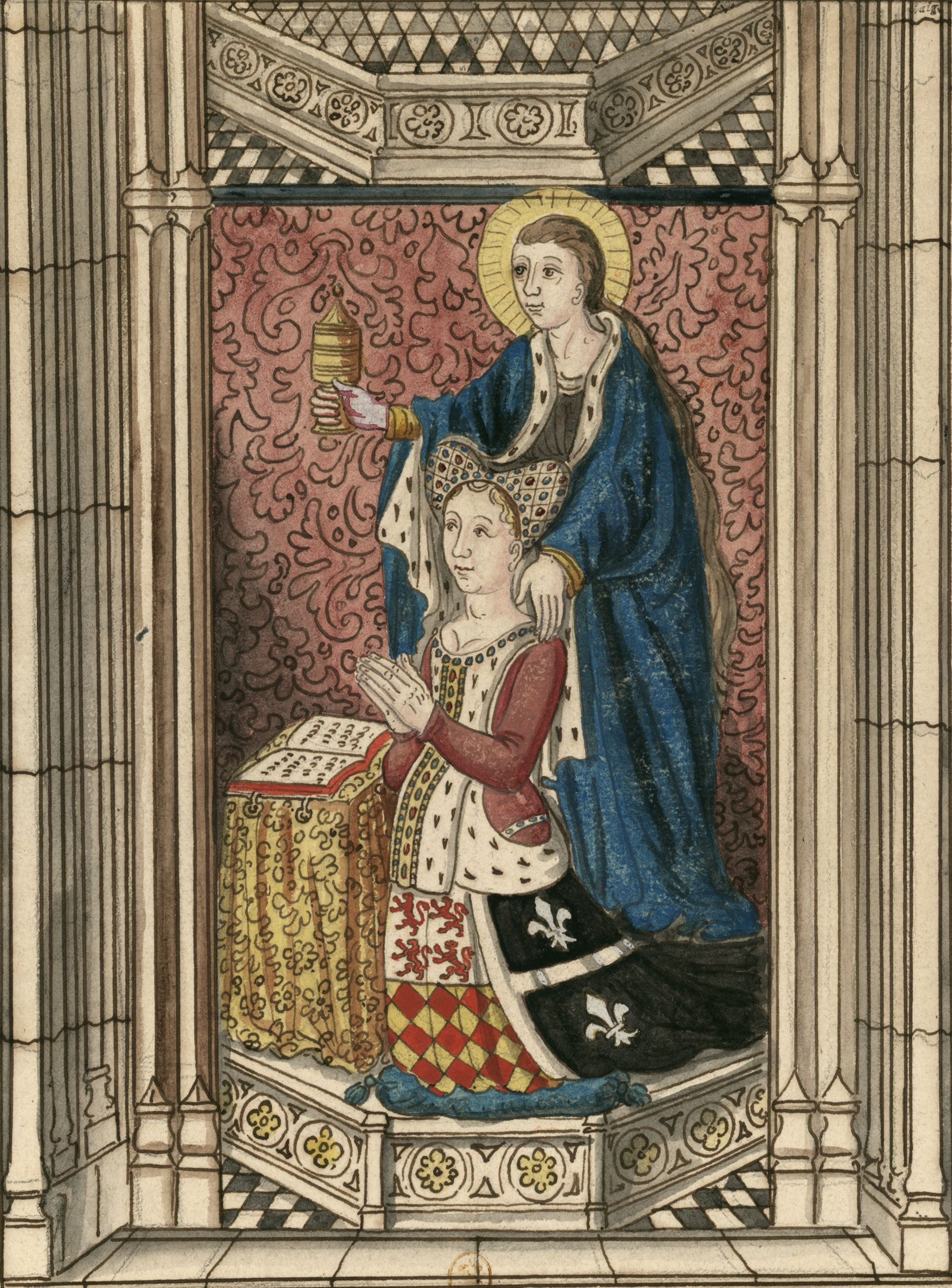 Cordeliers // Cette figure est aux vitres, derriere le grand Autel : Elle est de Marguerite de Chambley femme de Louis seigneur de Beauvau : [dessin] / [Louis Boudan?]